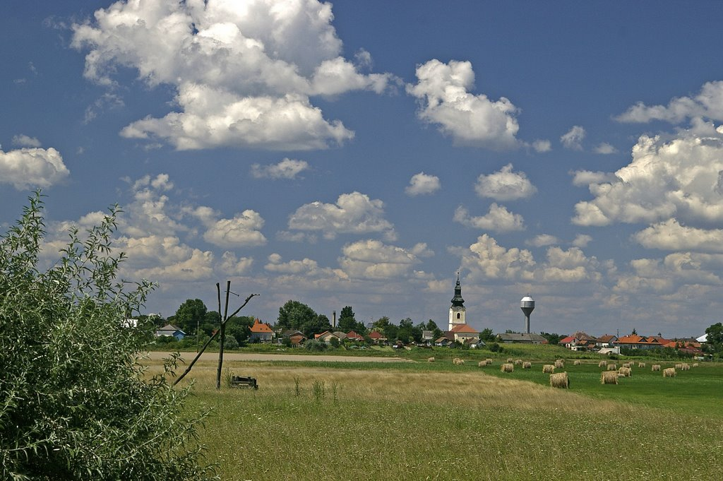 Újfehértó